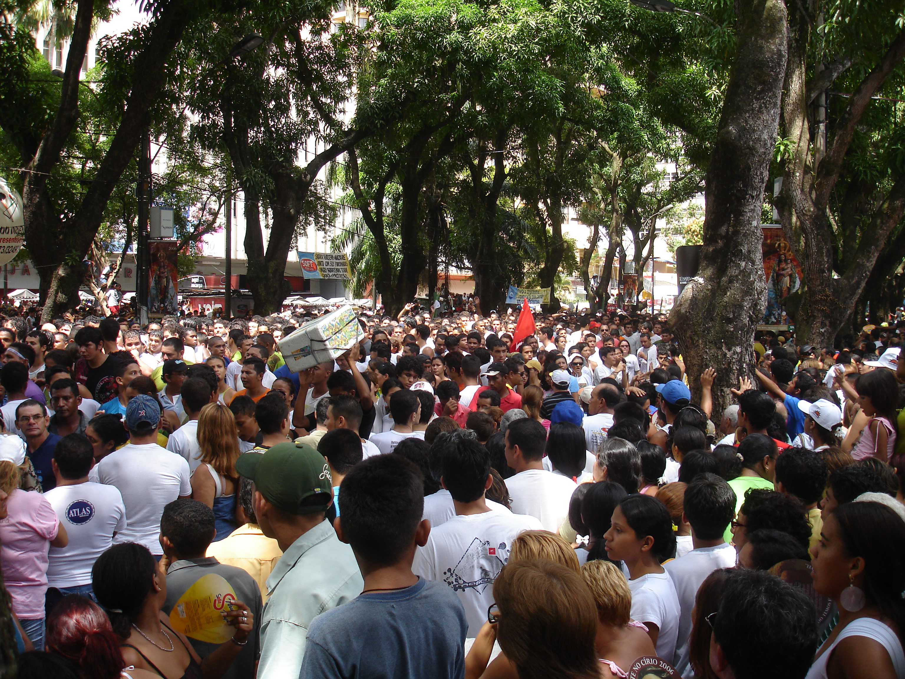 Our Lady of Nazareth’s Taper. Belém, Pará, Brazil / Círio de Nossa Senhora de Nazaré